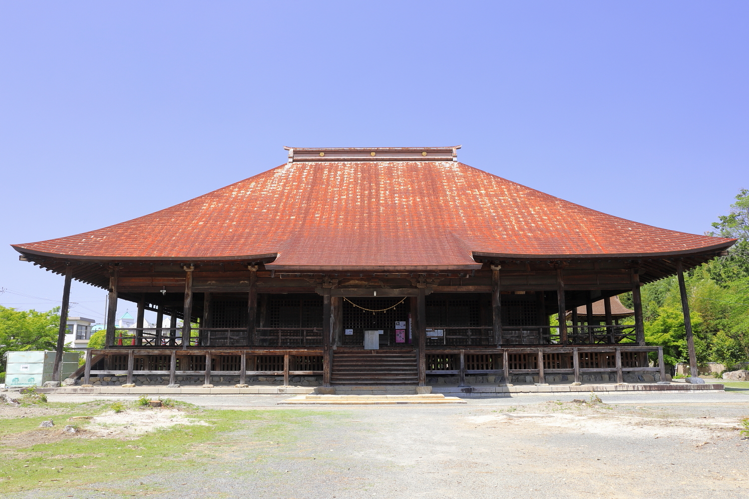 願興寺本堂（岐阜県可児郡御嵩町、2018年）